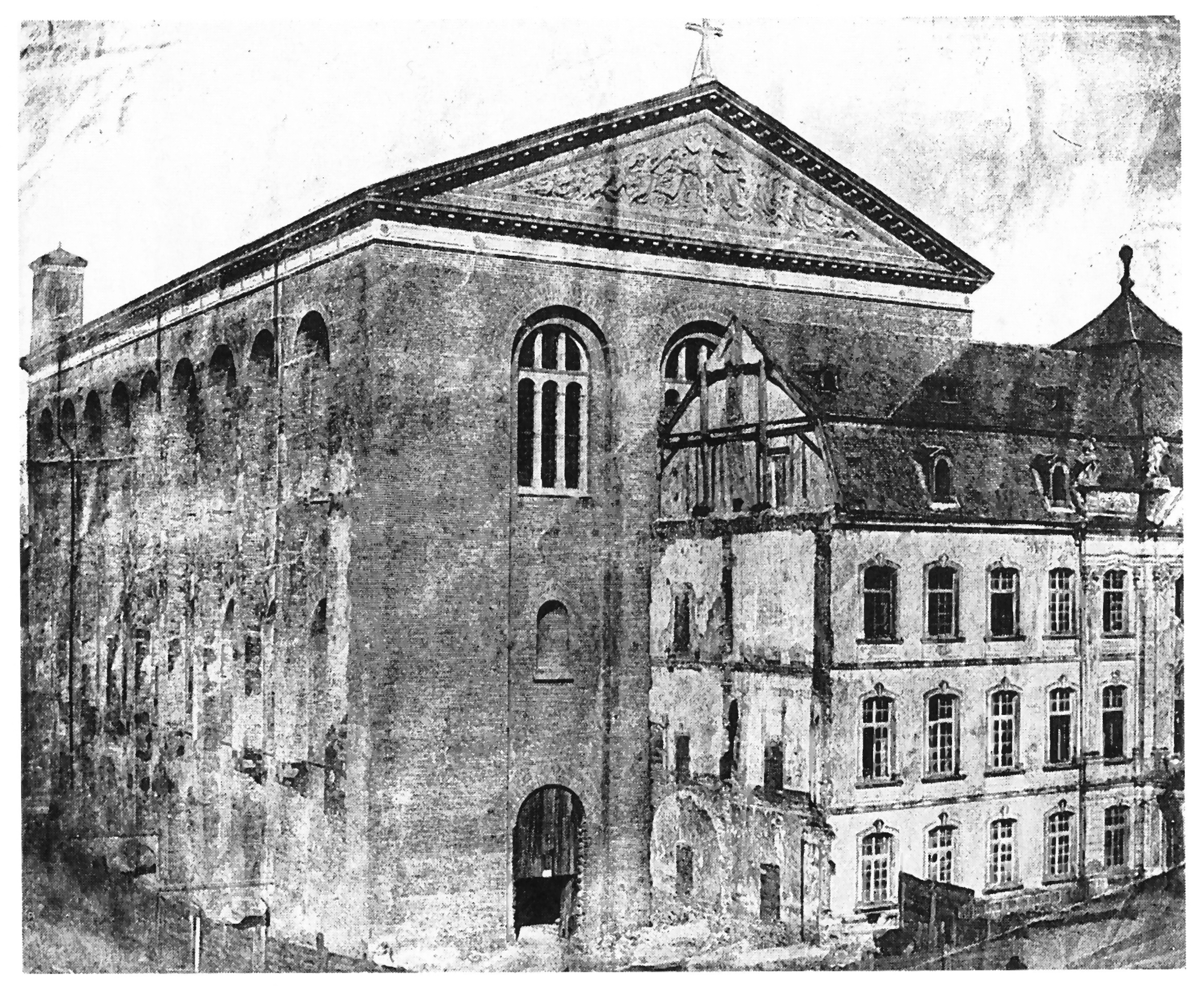 Konstantinbasilika Trier - Südfassade nach Teilabriss des Südflügels des Palais noch vor der Einweihung der Südfassade